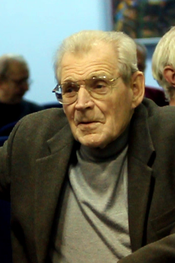 Андрей Викторович Гапонов-Грехов, академик РАН, основатель и первый директор Института прикладной физики РАН